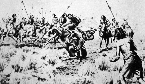 Muerte de Rauch en las Viscacheras